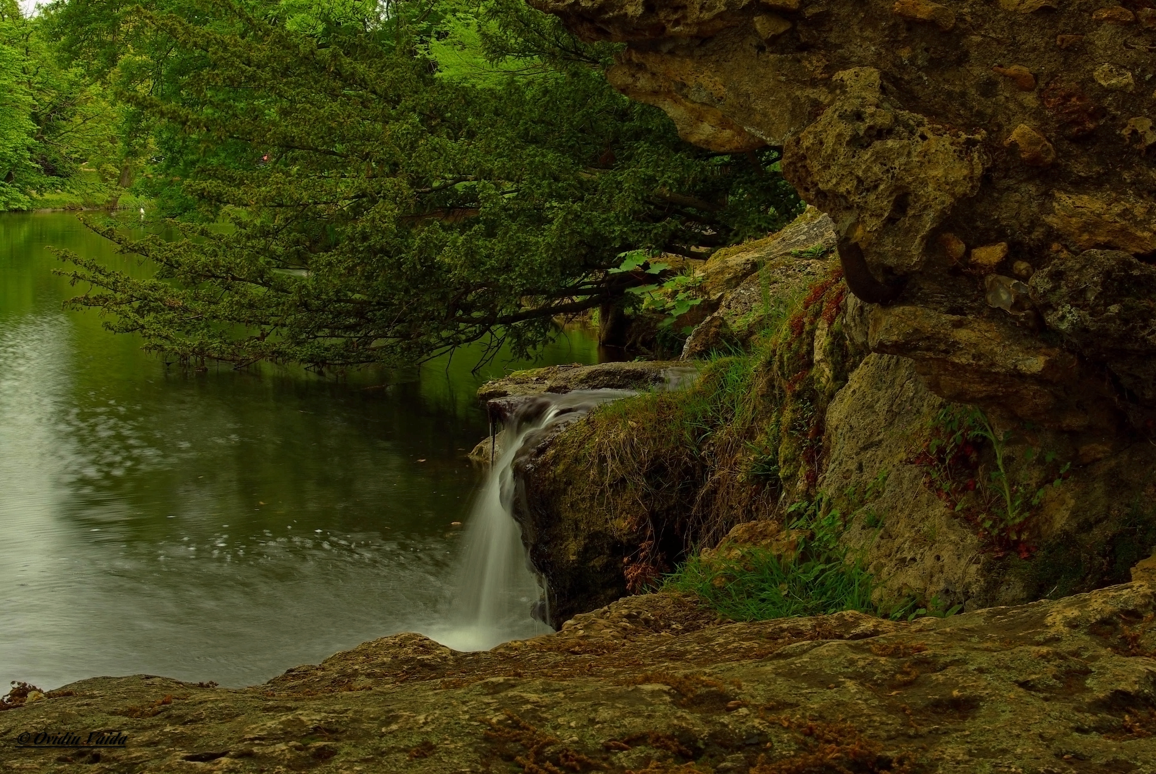 Superbe cascade Lac des Ibis